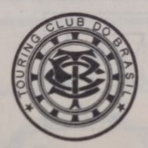 Antiga logomarca do Touring Club do Brasil.